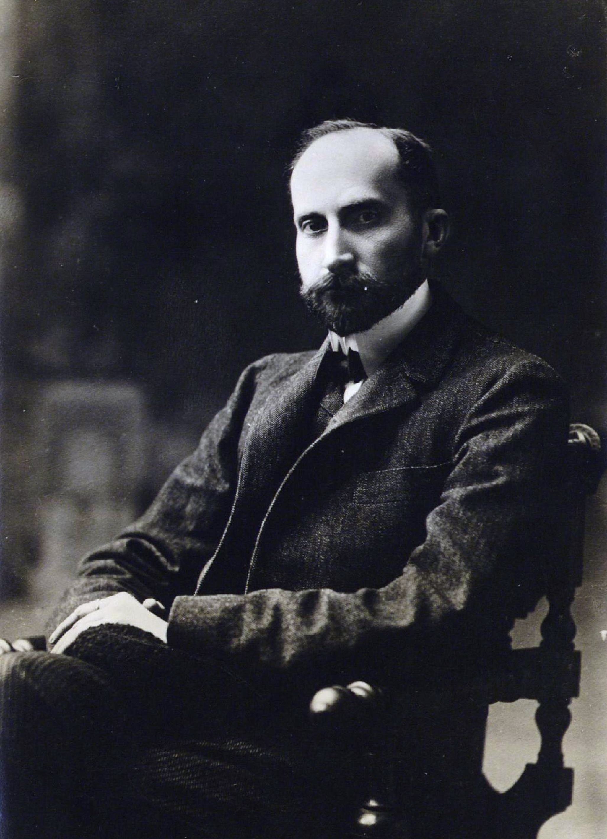 Львов, Николай Николаевич